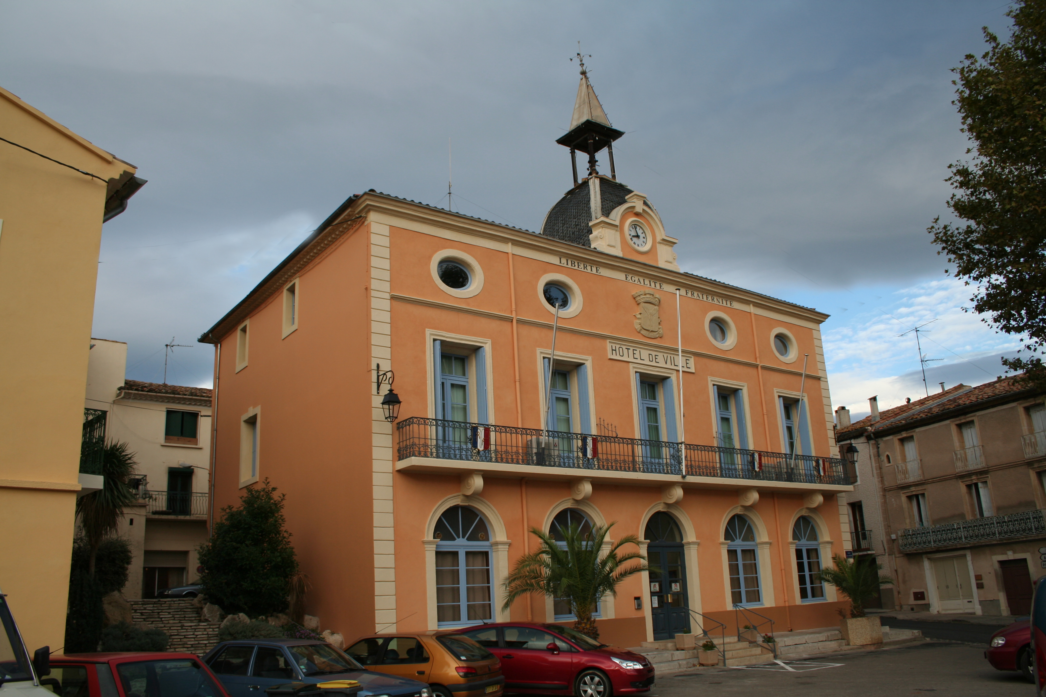 Roujan (Hérault) - hôtel de ville.